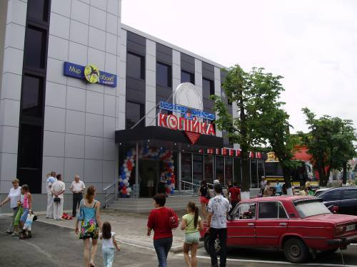 Універсам "Копійка" в Котовську